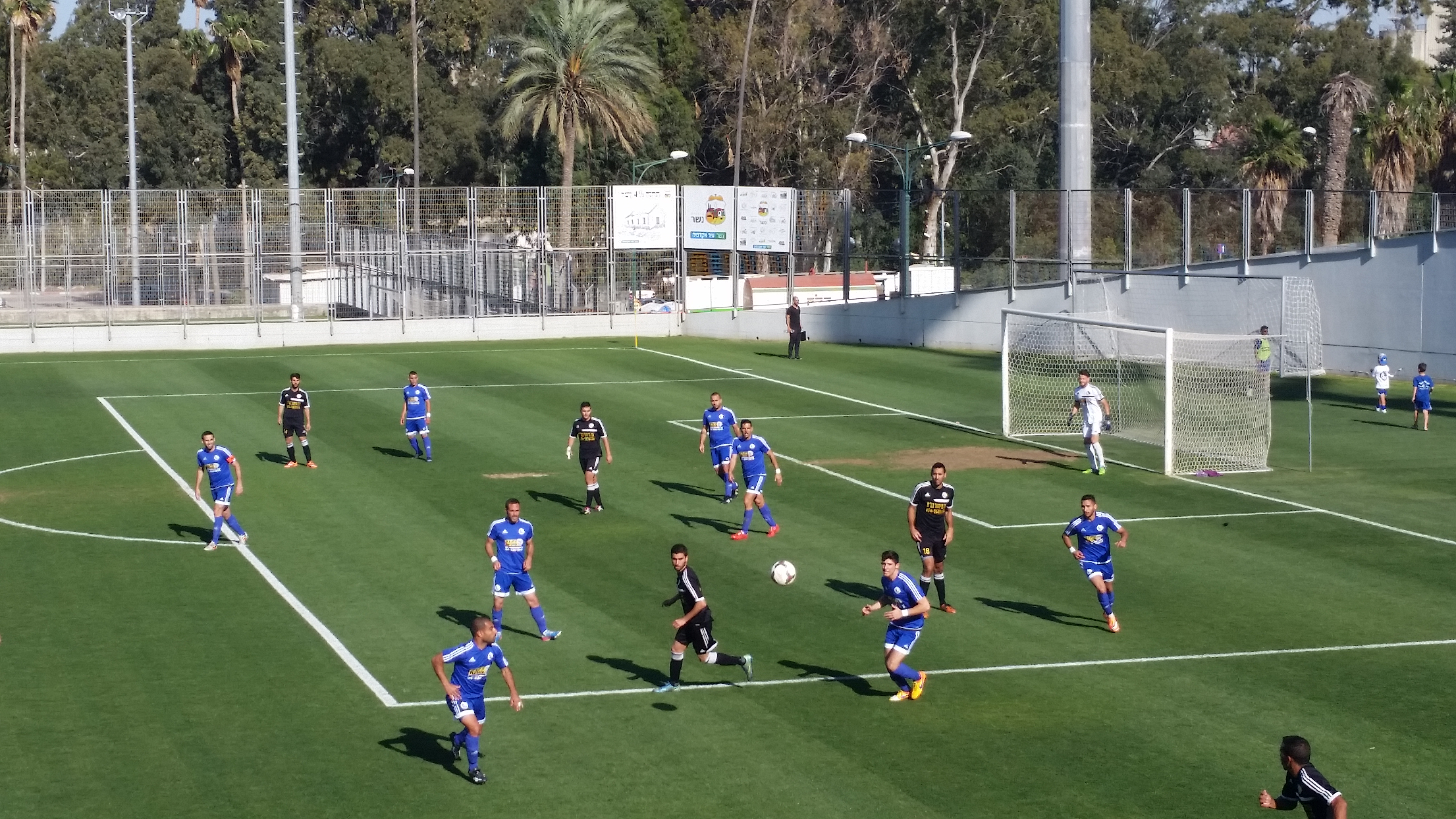 קבוצת כדורגל עירוני נשר במשחק הכתרה של סיום העונה בליגה א צפון ועלייה לליגה הלאומית. משחקת מול מכבי צור שלום